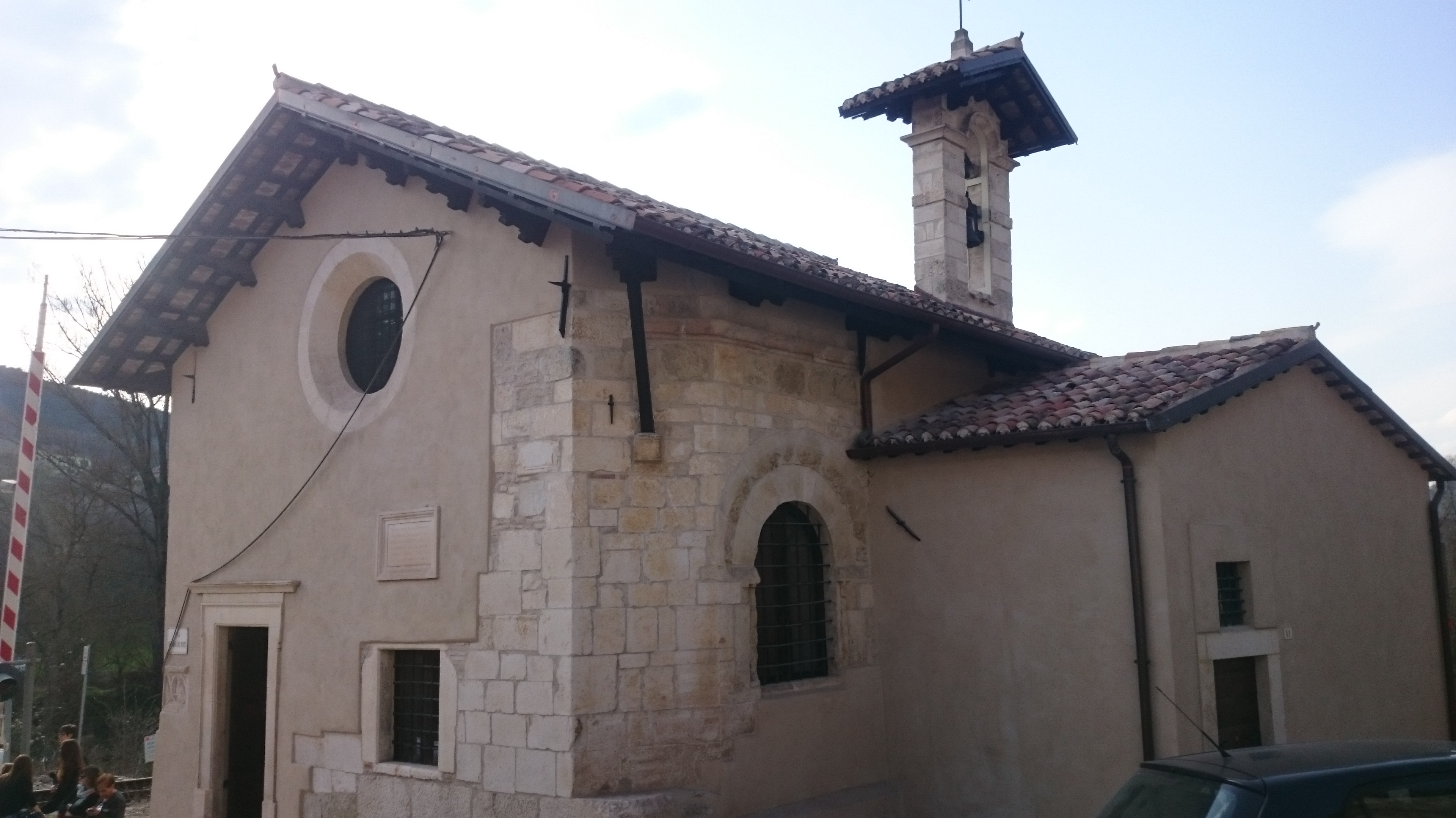 L'Aquila: Chiesa di Santa Maria del Ponte